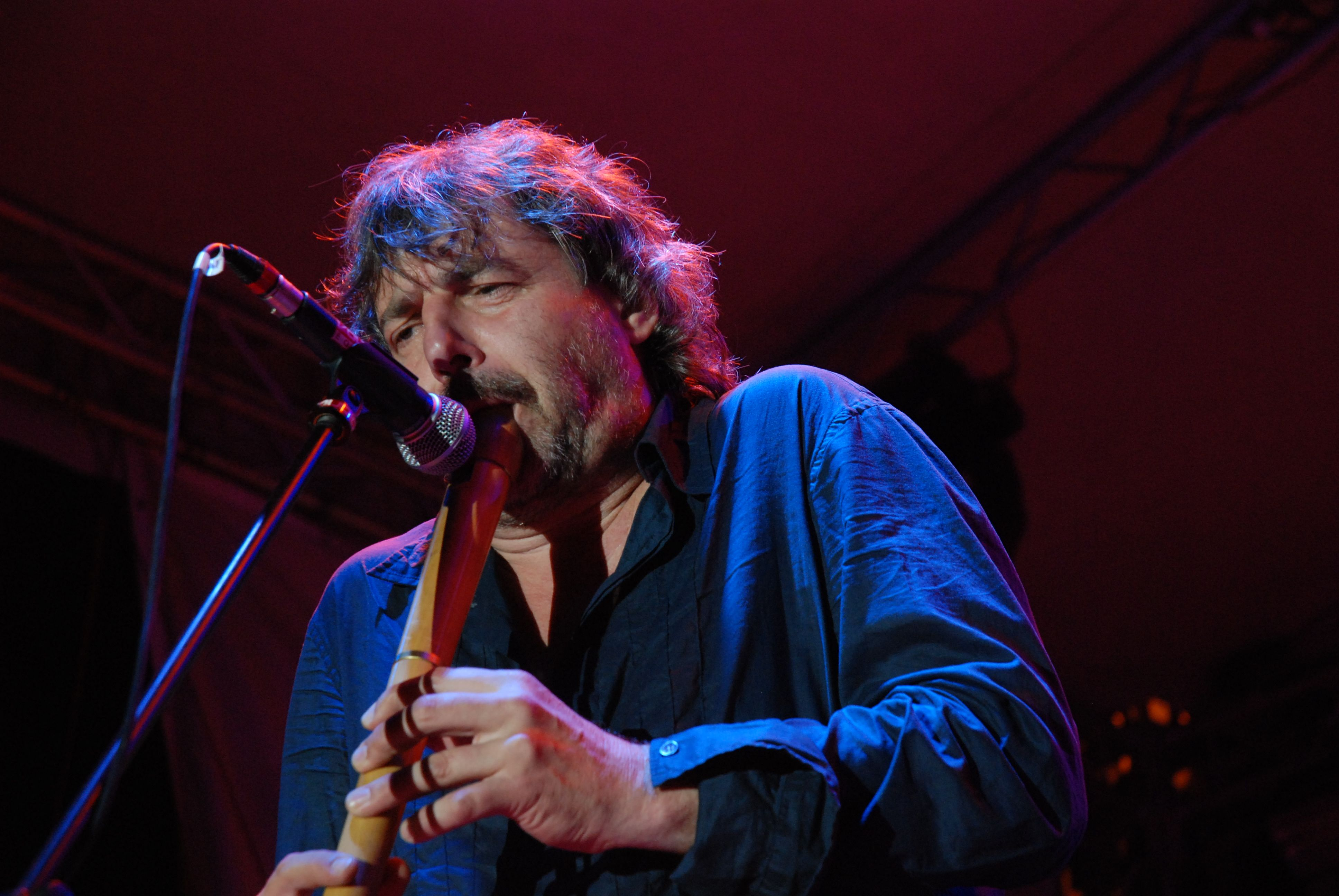 Mani Neumann, concert al formației Phoenix, Șimleu Silvaniei, 14 iulie 2007.